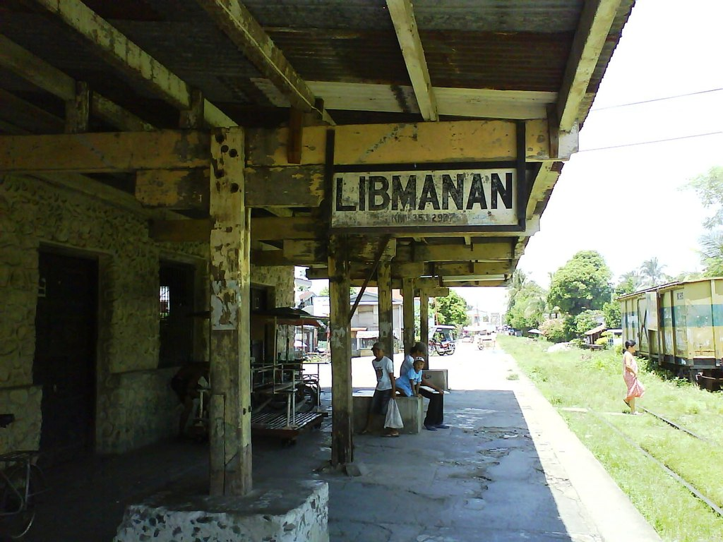 Libmanan, Camarines Sur, Philippines